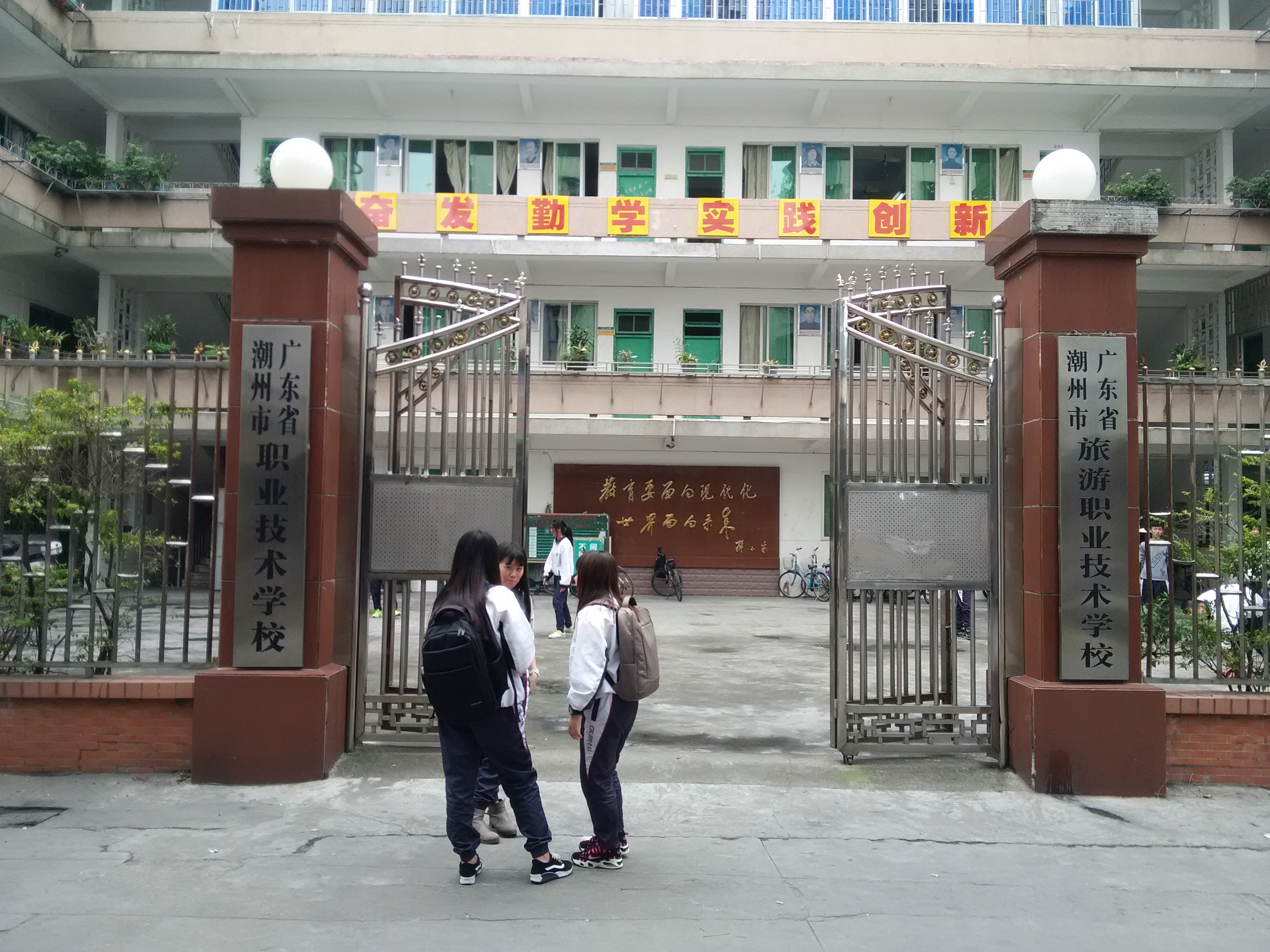 潮州市职业技术学校校门（官诰巷校区）